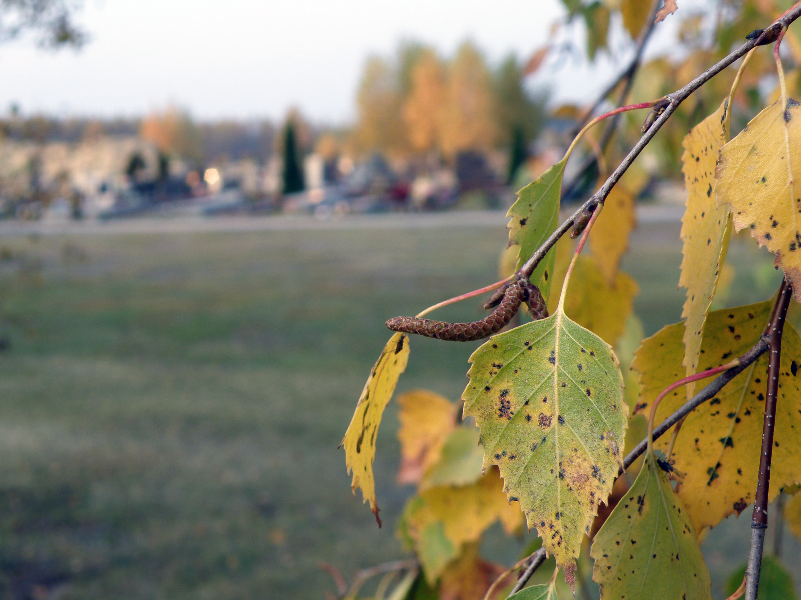 Warszawa: Komunalny Cmentarz Południowy, Antoninów, gmina Piaseczno. OLYMPUS DIGITAL CAMERA